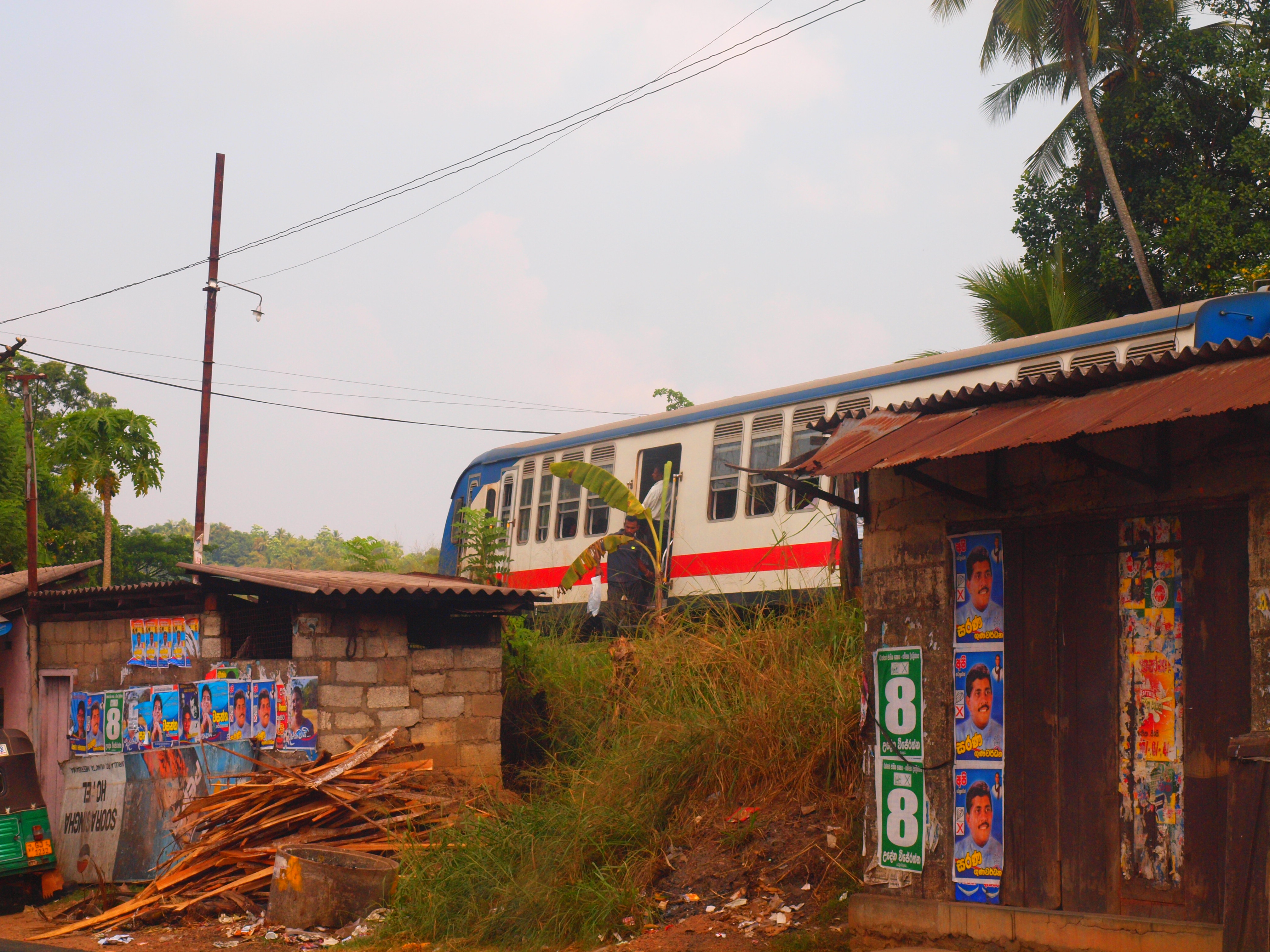 Train in Sri Lanka - 2010